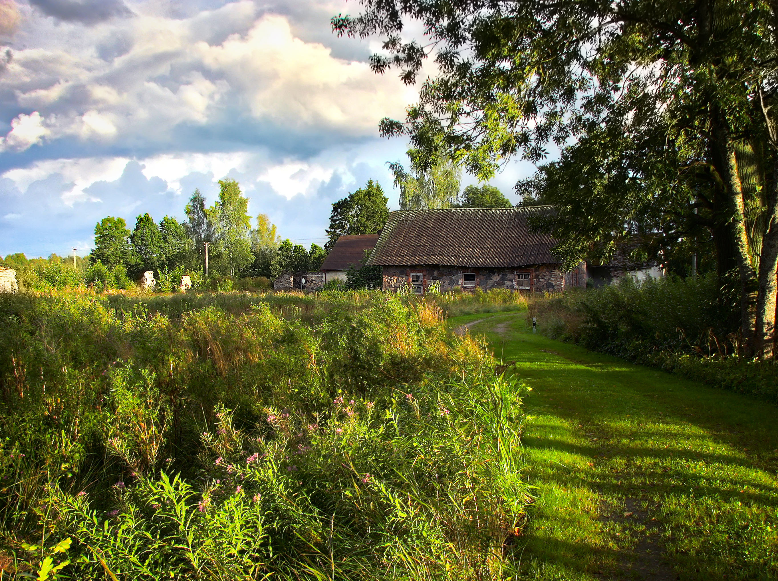 у руин поместья Огрес